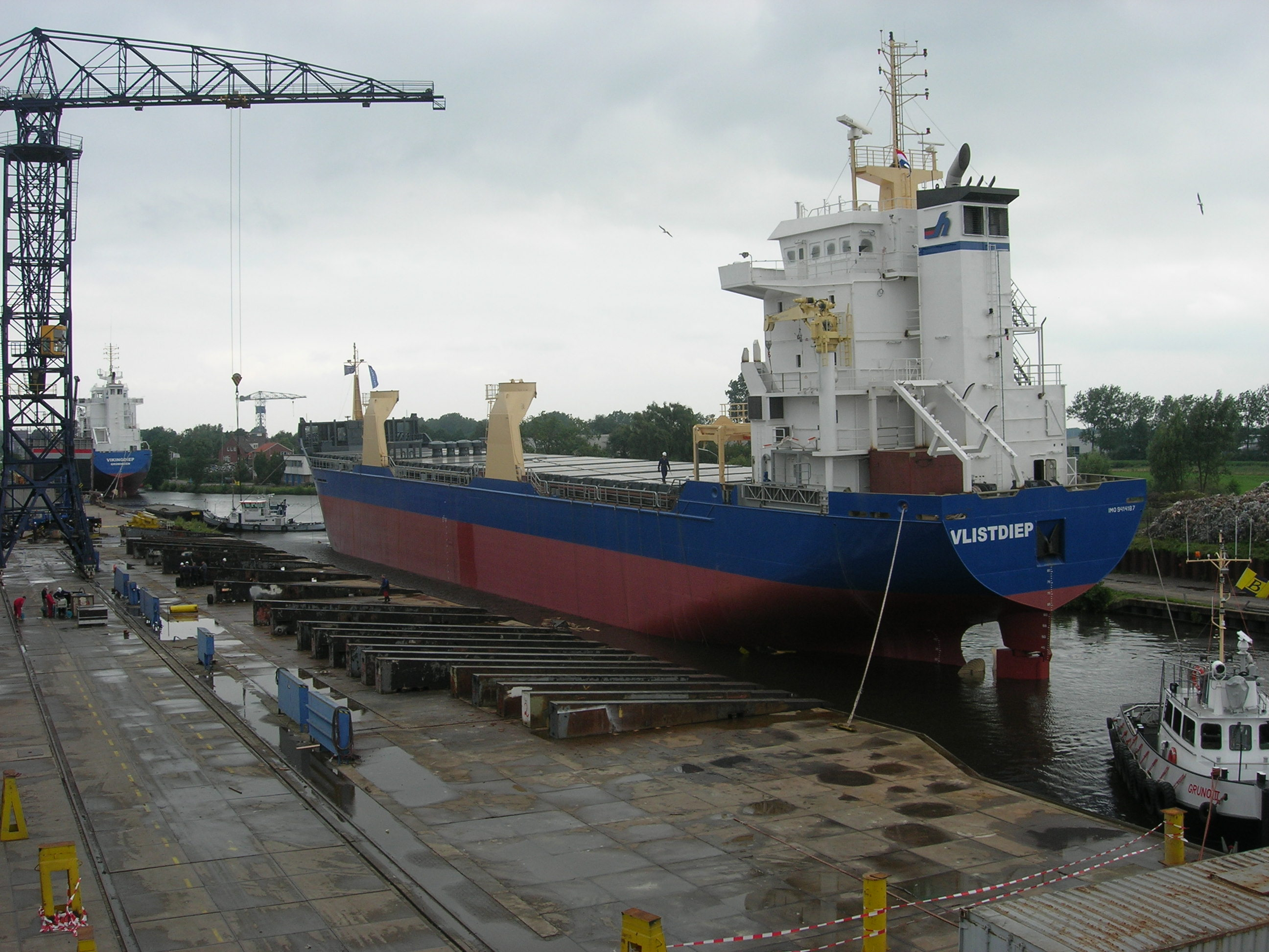 General Cargo Ship Vlistdiep